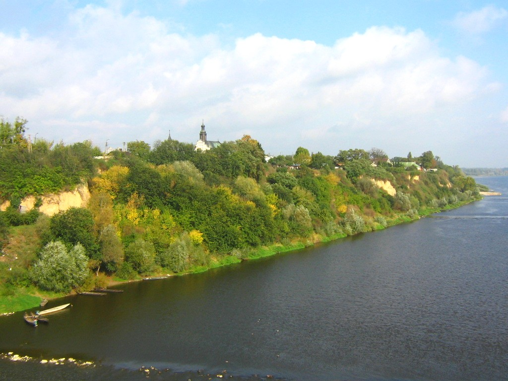 Panorama Wyszogrodu (widok z nowego mostu)